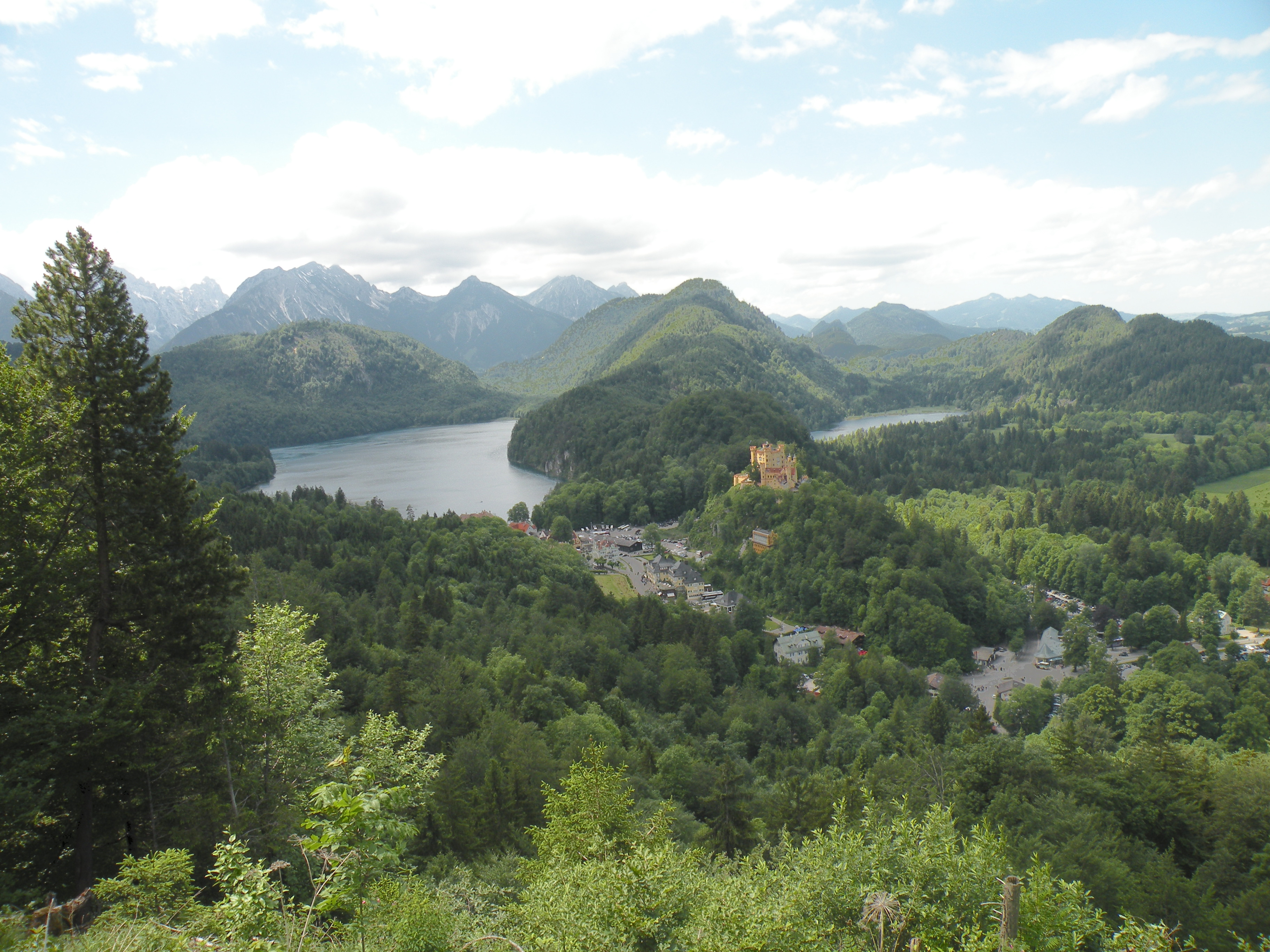 Альпы.Замок Хоэншвангау